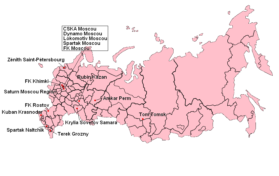 Participants à la Premier League 2009